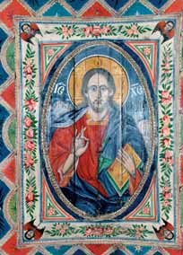 Христос Пантократор, фреска от църквата "Свети Димитър" в Боймица, Гърция.